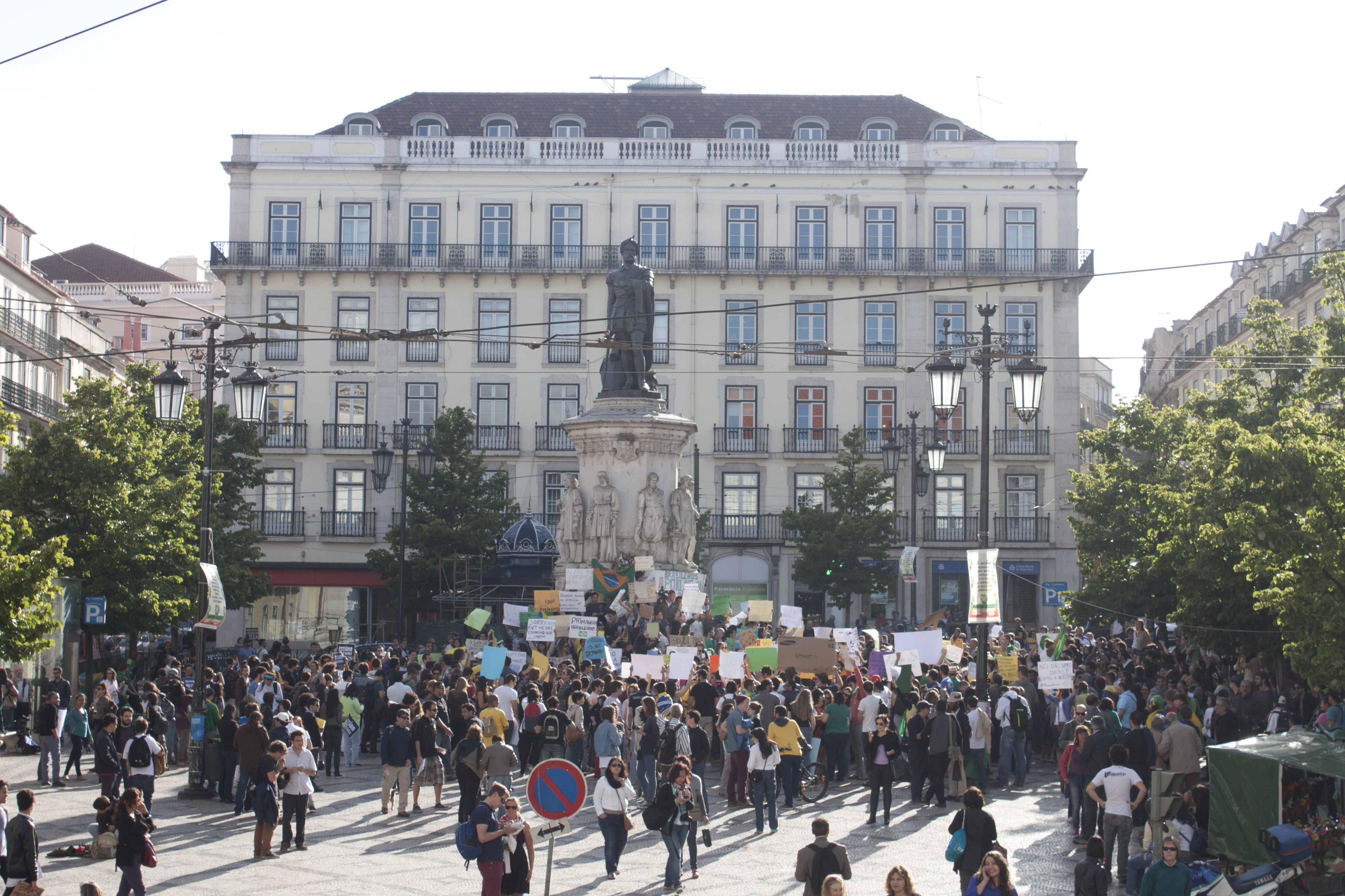 Protesto em Lisboa de apoio aos protestos no Brasil em 2013